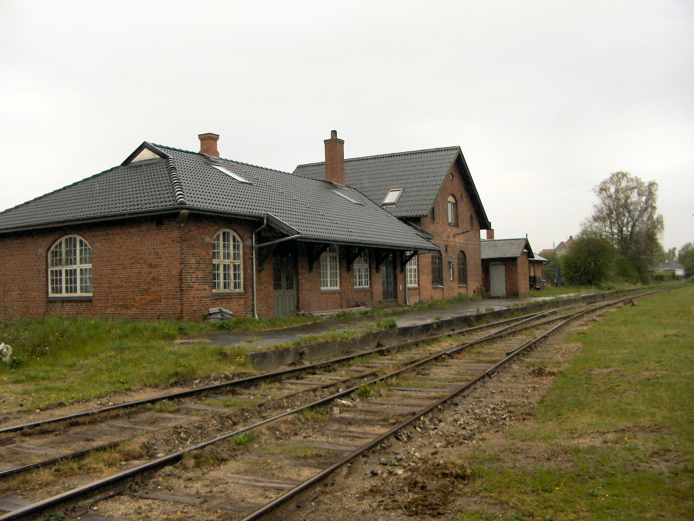 Gørlev_Station